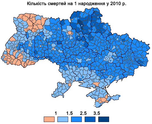 Death to birth rate in Ukraine, 2010